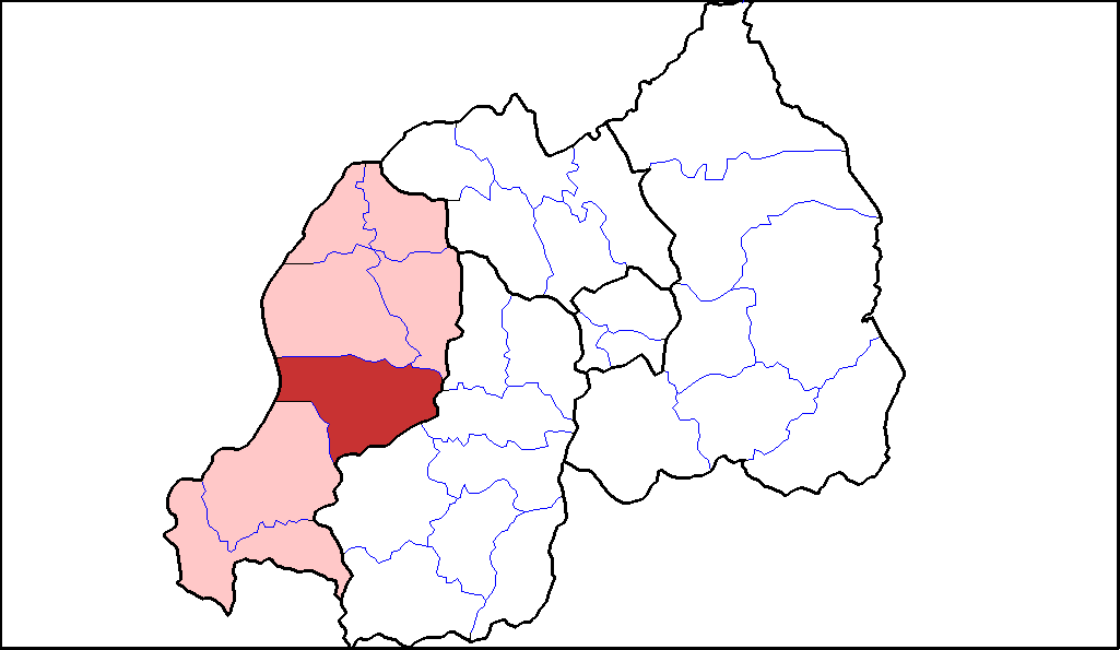 Distretto di Karongi.